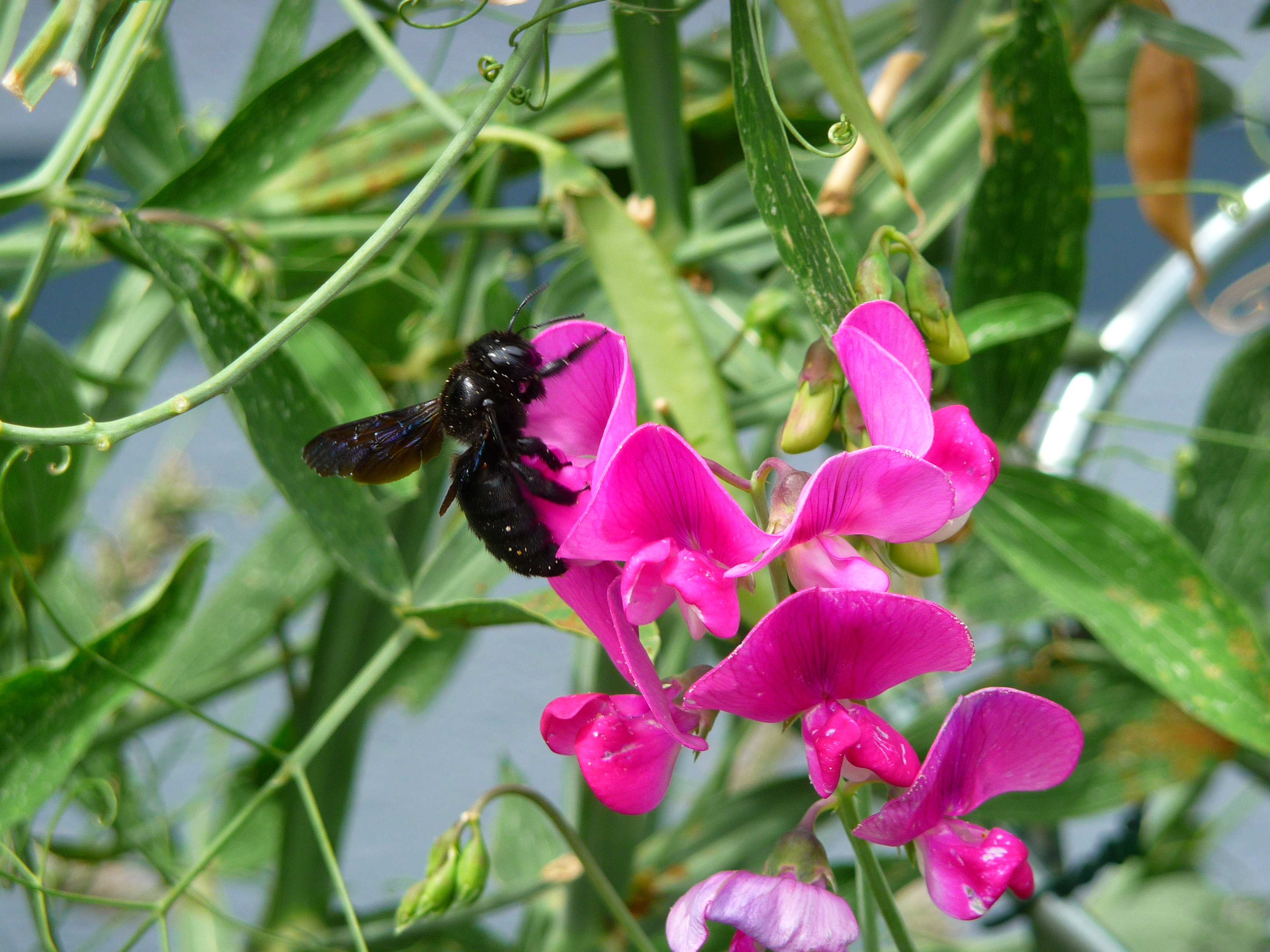 Holzbiene (Xylocopa violacea) auf breitblättriger Platterbse